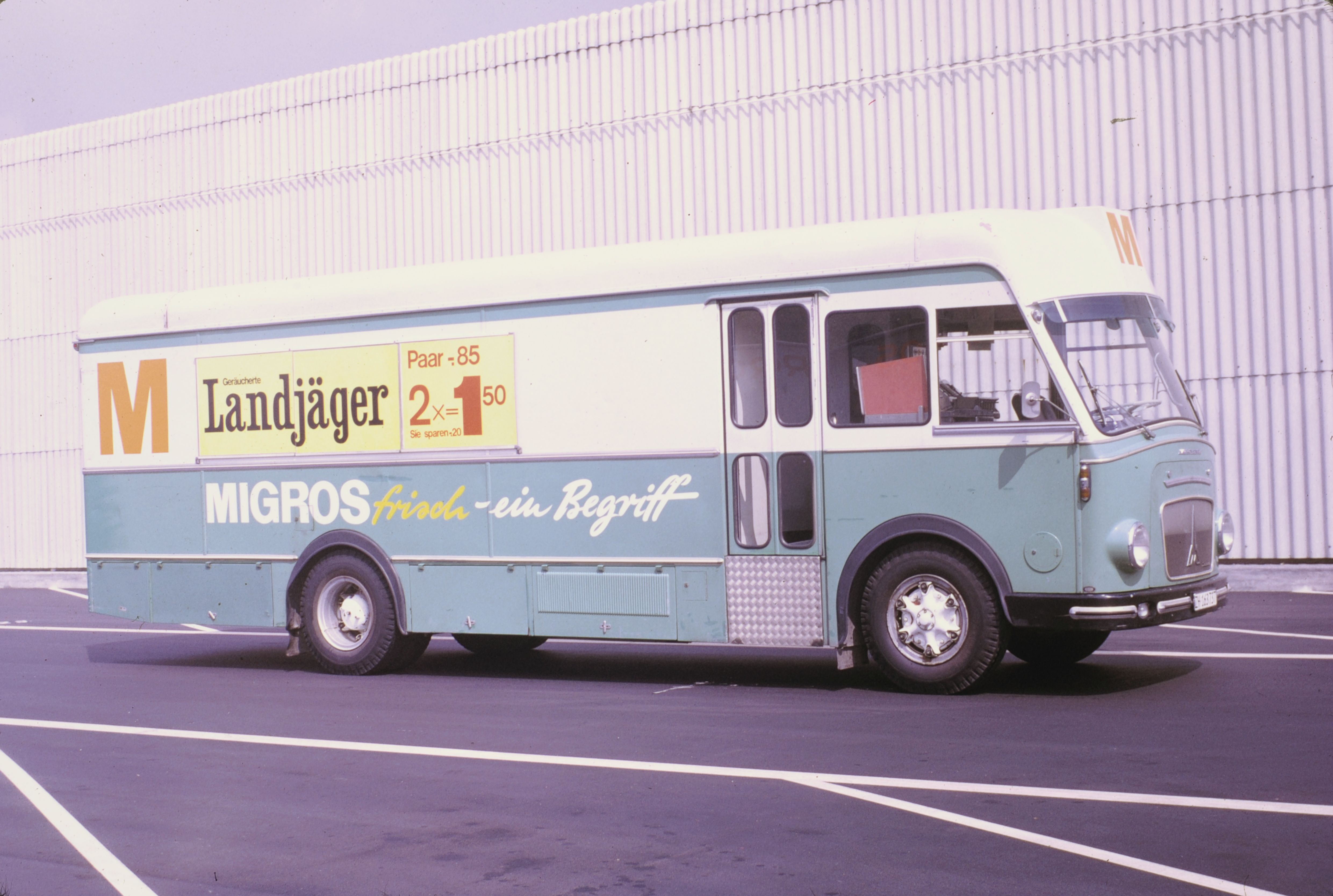 Migros-Verkaufswagen mit Landjäger-Werbung: Migros frisch - ein Begriff, Magirus-Deutz